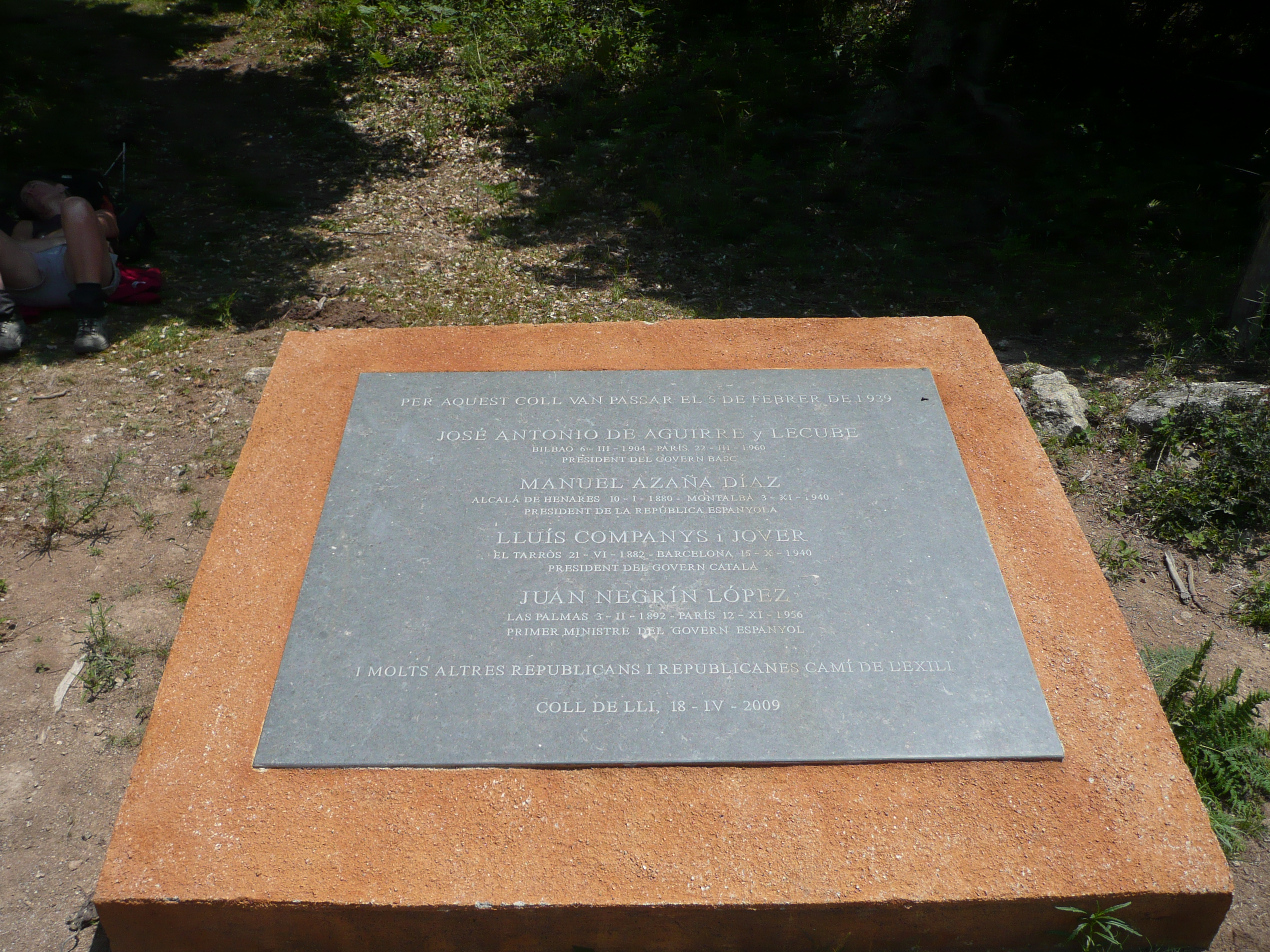 Le président de la république, le premier ministre espagnol, les présidents des régions basque et catalane en exil sont passés par le col de Lli (entre La Vajol et las Ilas) pour se réfugier en France